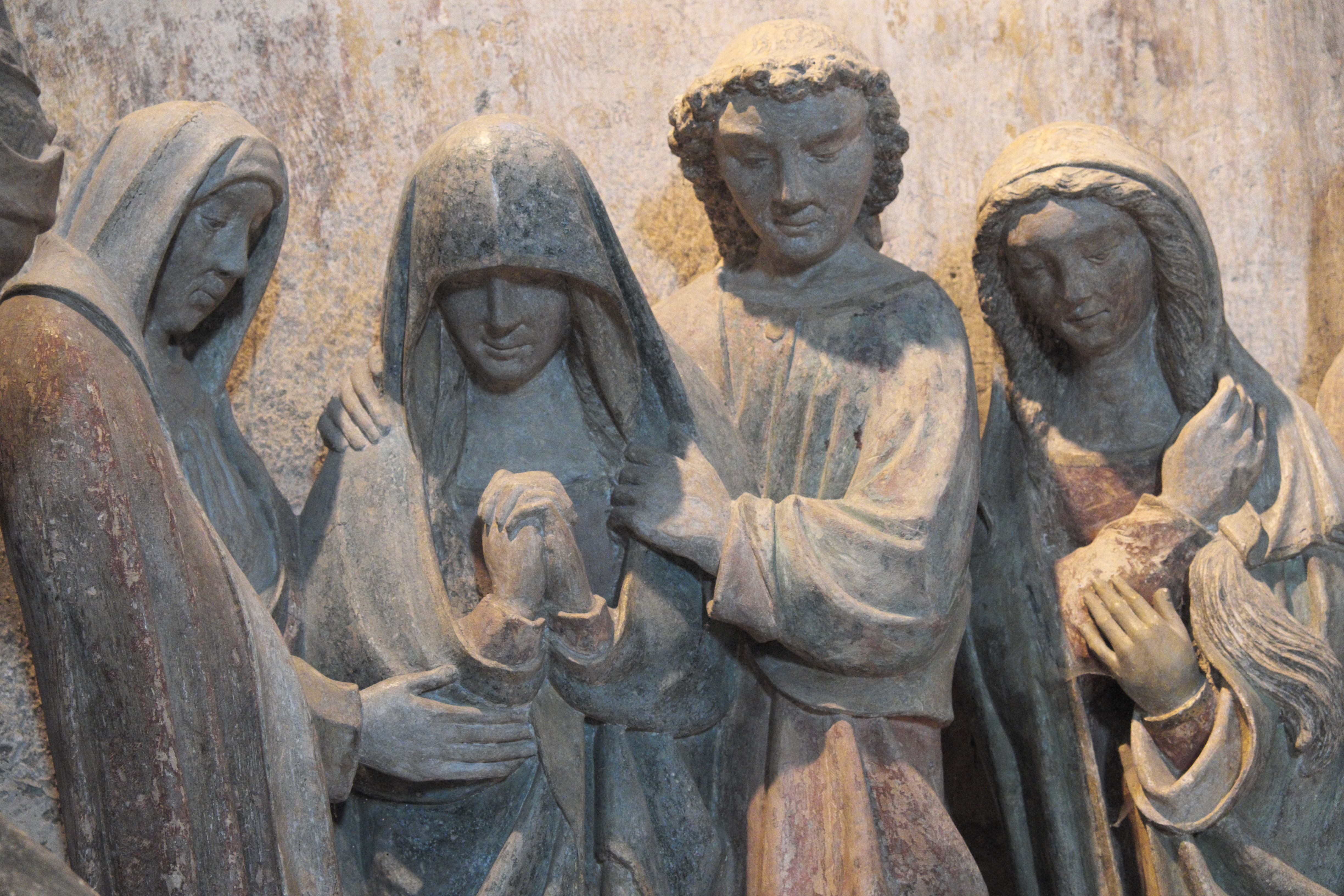 Katholische Pfarrkirche, ehemalige Stiftskirche, Saint-Cerneuf in Billom im Département Puy-de-Dôme (Auvergne-Rhône-Alpes), Grablegungsgruppe aus der ersten Hälfte des 16. Jahrhunderts